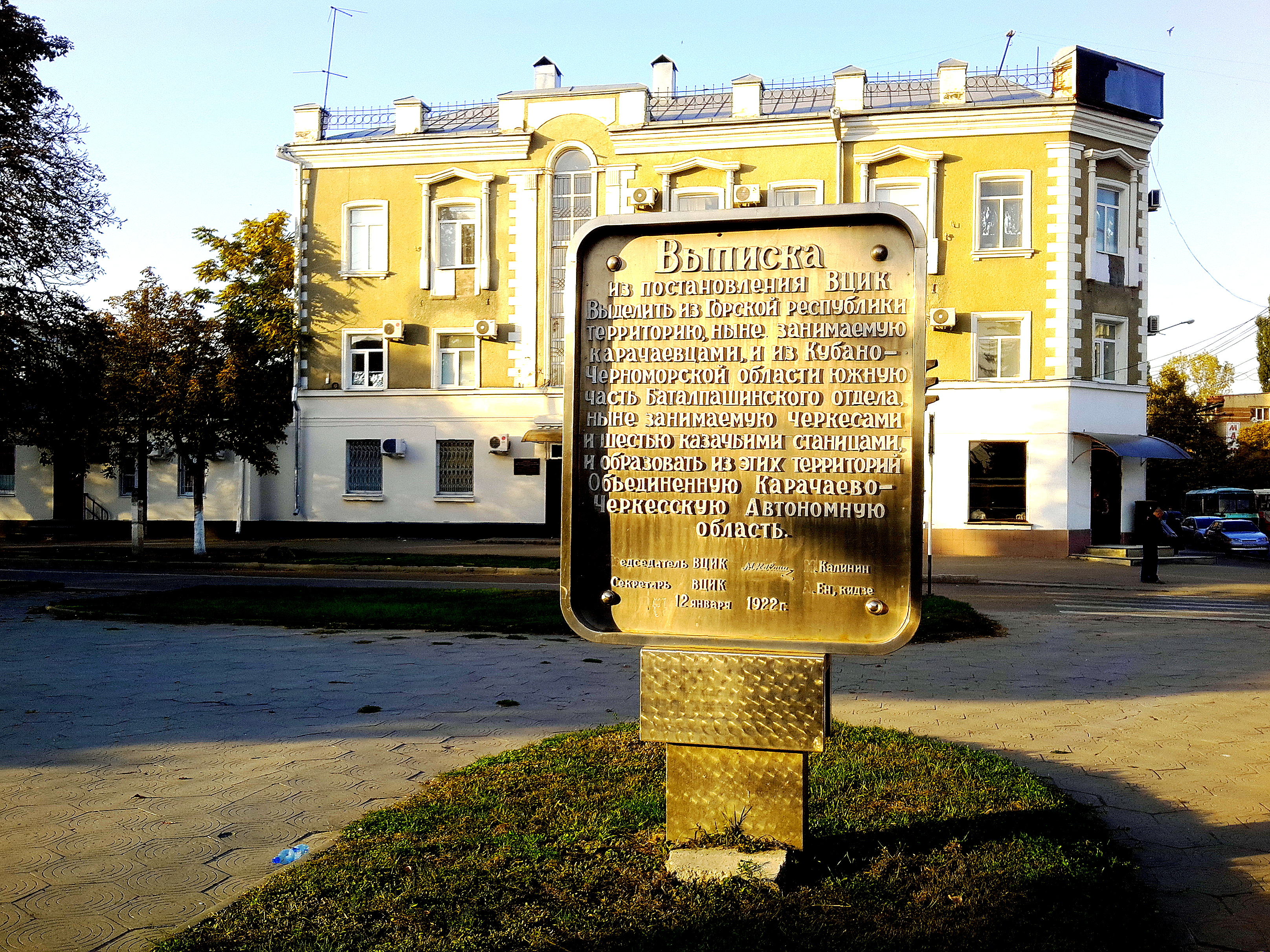 важная выписка из постановления ВЦИК